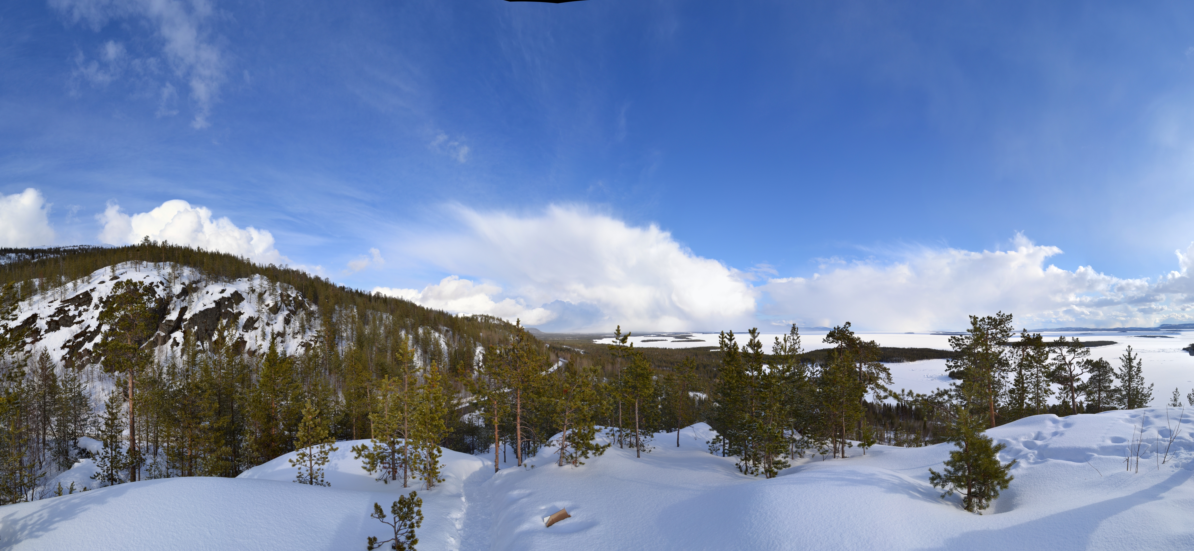 Дорога на Умбу. Апрель 2012 г.